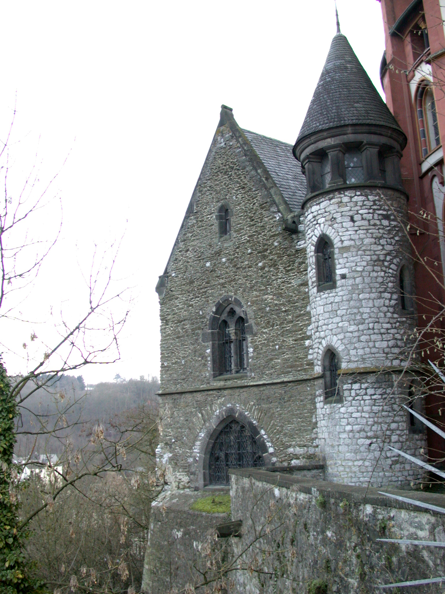 Burg Limburg, Deutschland, beschädigte Nordostecke von außen